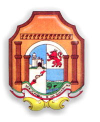 escudo de hualahuises, Nuevo León